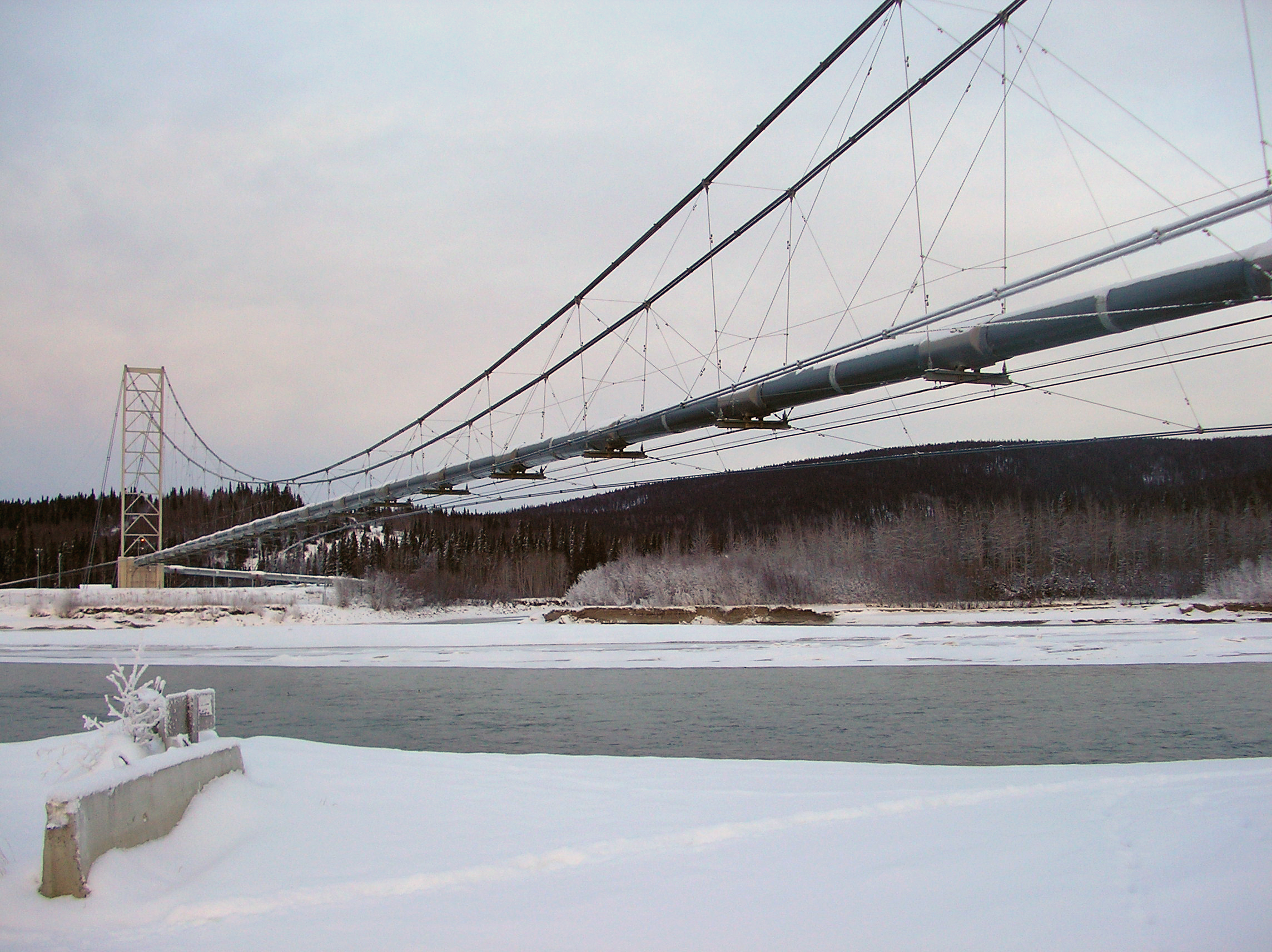 Trans-Alaska pipeline bridge